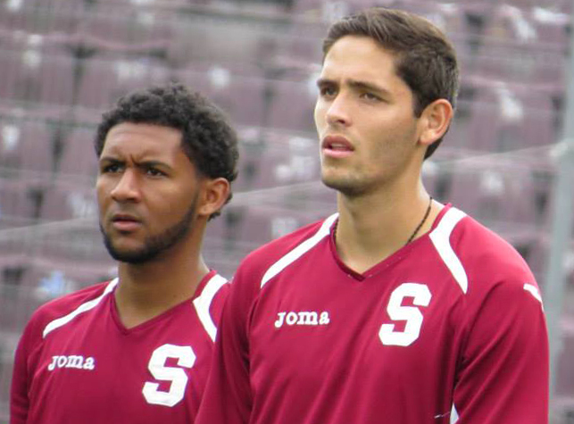 13-11-2013. Jonathan Moya y Dylan Flores en un entrenamiento con Generación Saprissa.